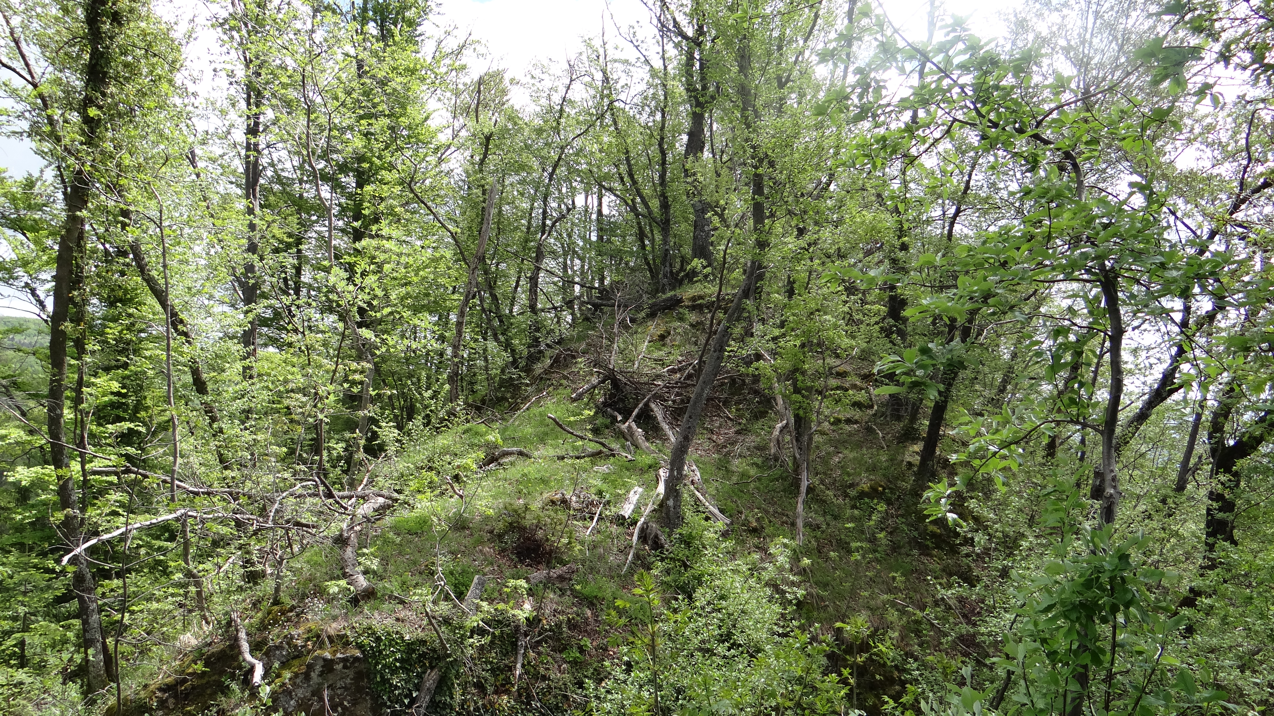 Delni sledovi gradu Tvarog 2013